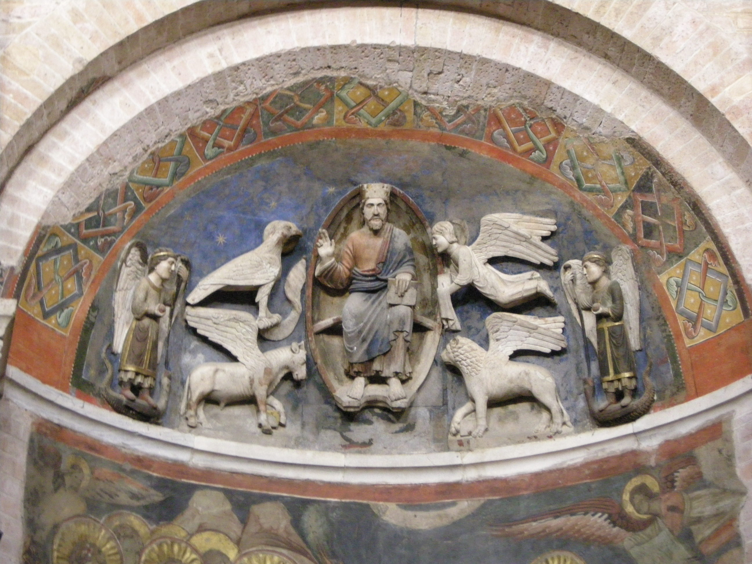 Battistero di parma, interno, lunetta 05 dio e tetramorfo